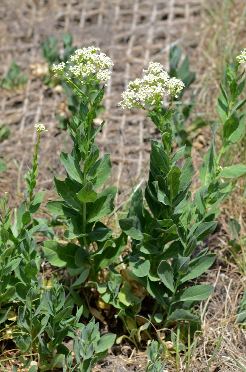 Cardaria draba